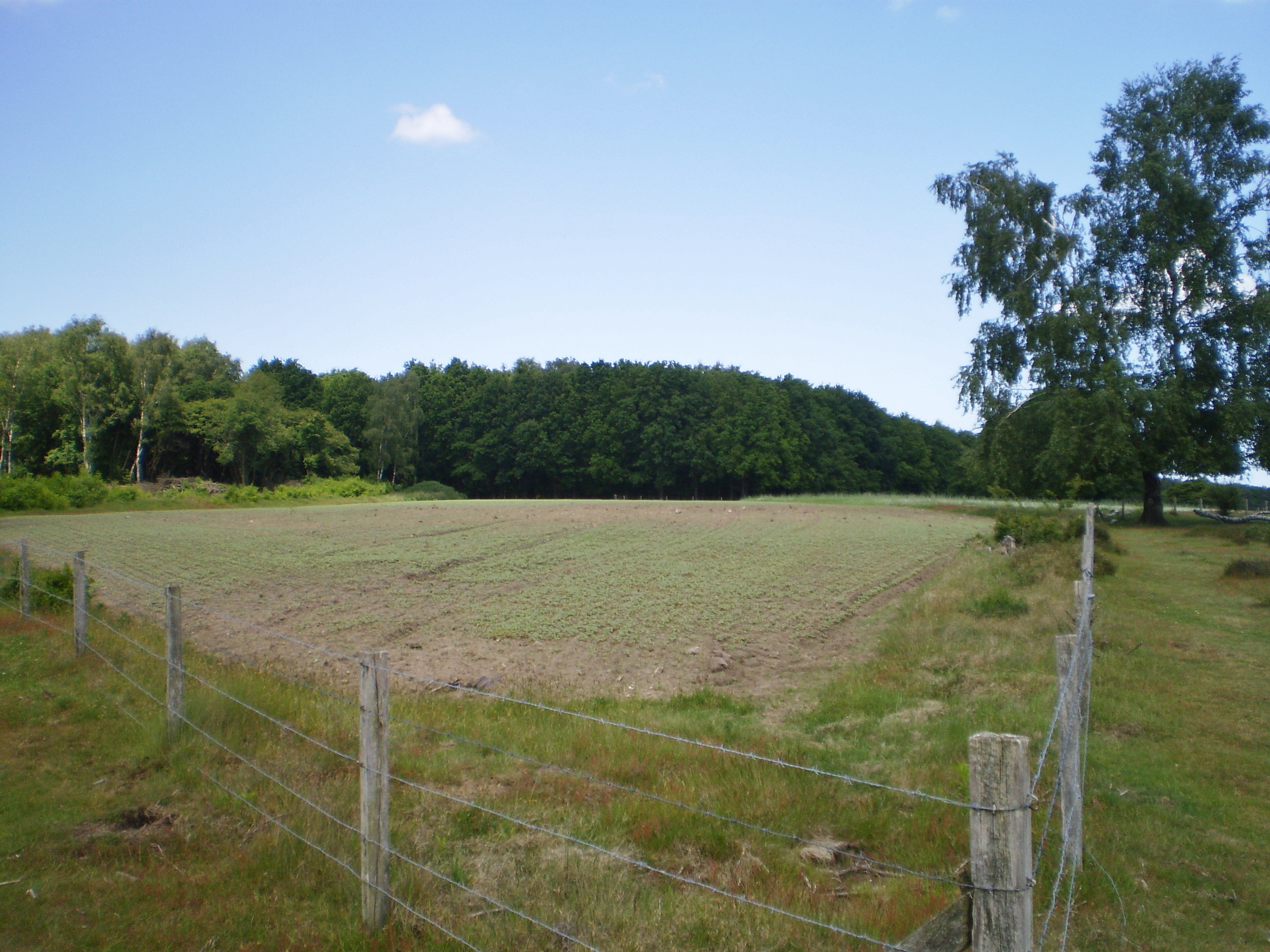 Westerheide, boekweitveld bij de Aardjesberg